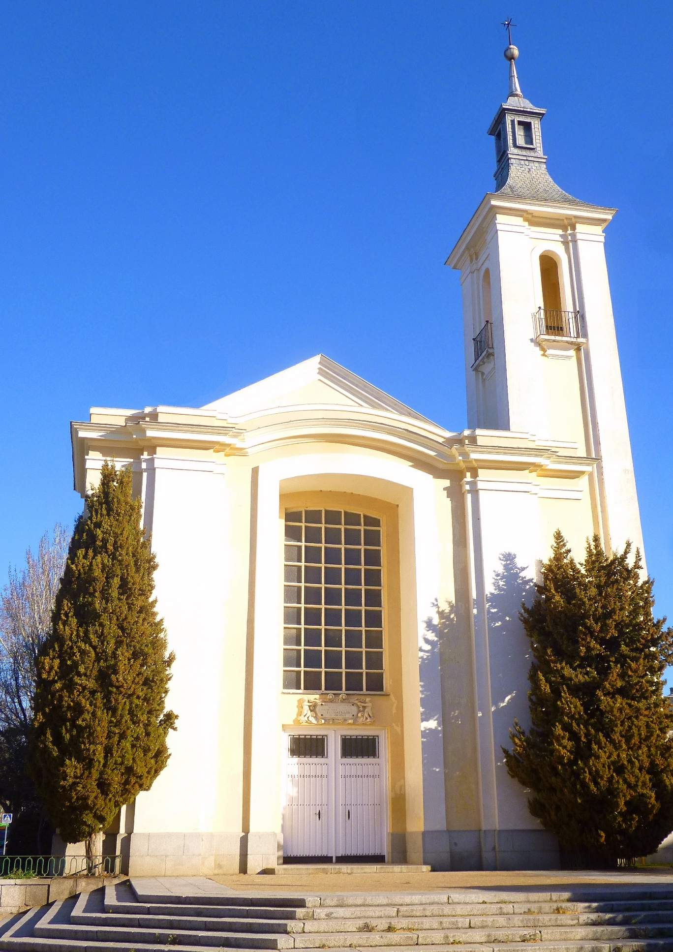 Iglesia del Carmen (Parroquia de la Inmaculada Concepción). El Pardo, Madrid